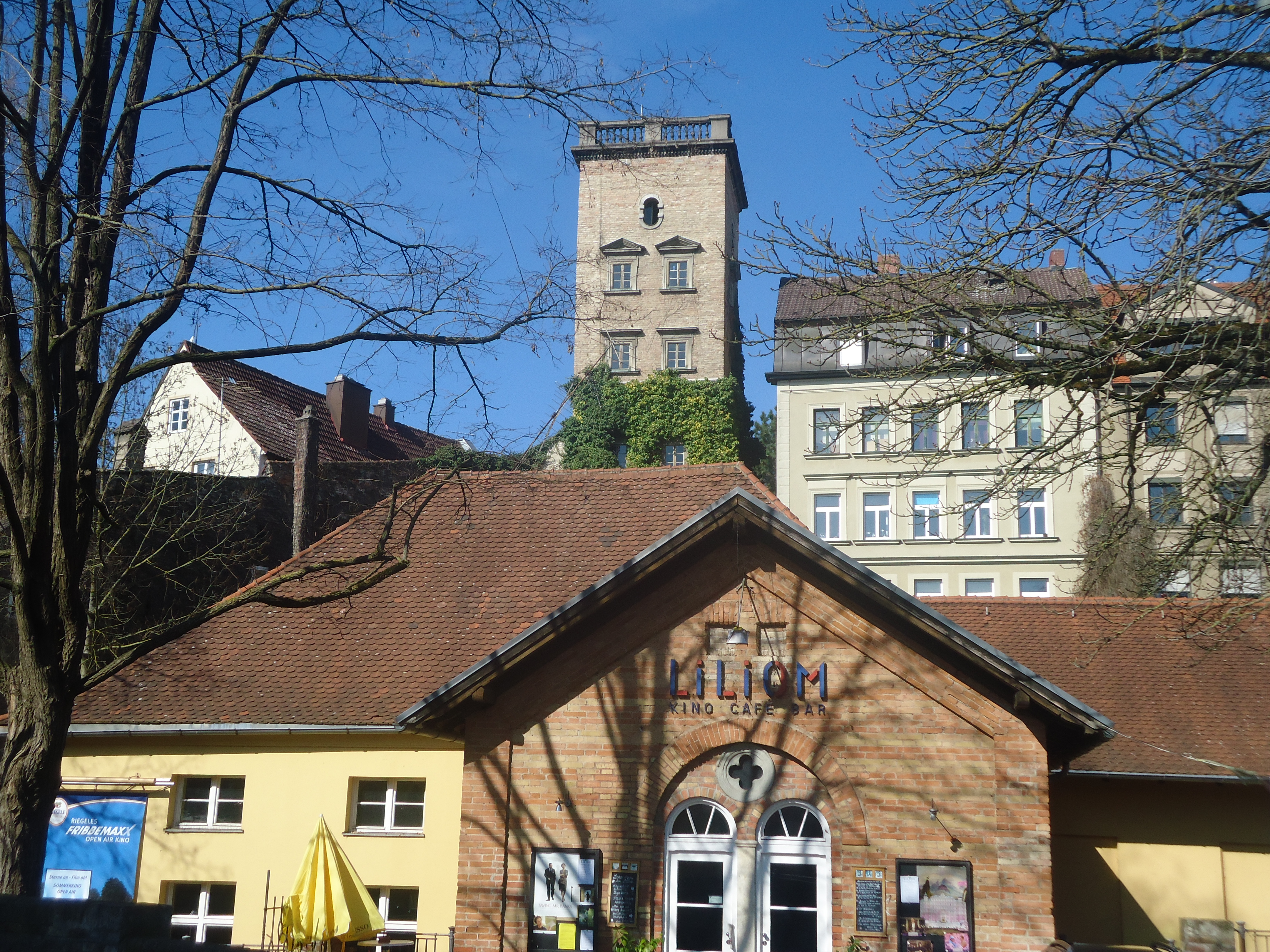 Unterer Brunnenturm und Wasserwerk beim Liliom